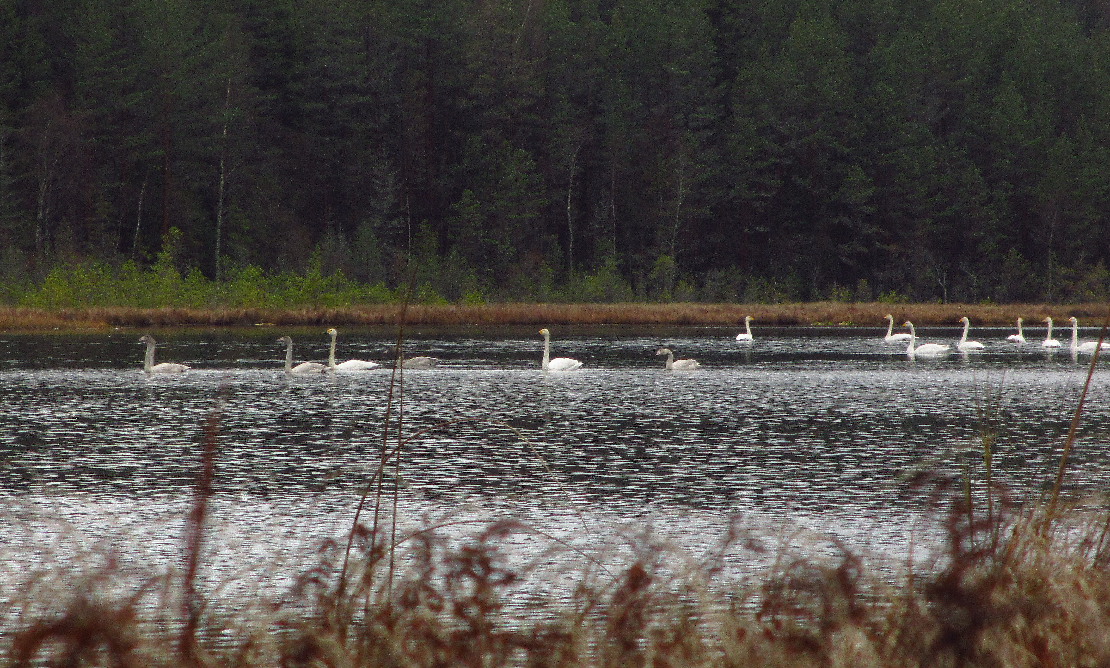 Laululuiged (Cygnus cygnus) Lindjärvel Paunküla MKA-l